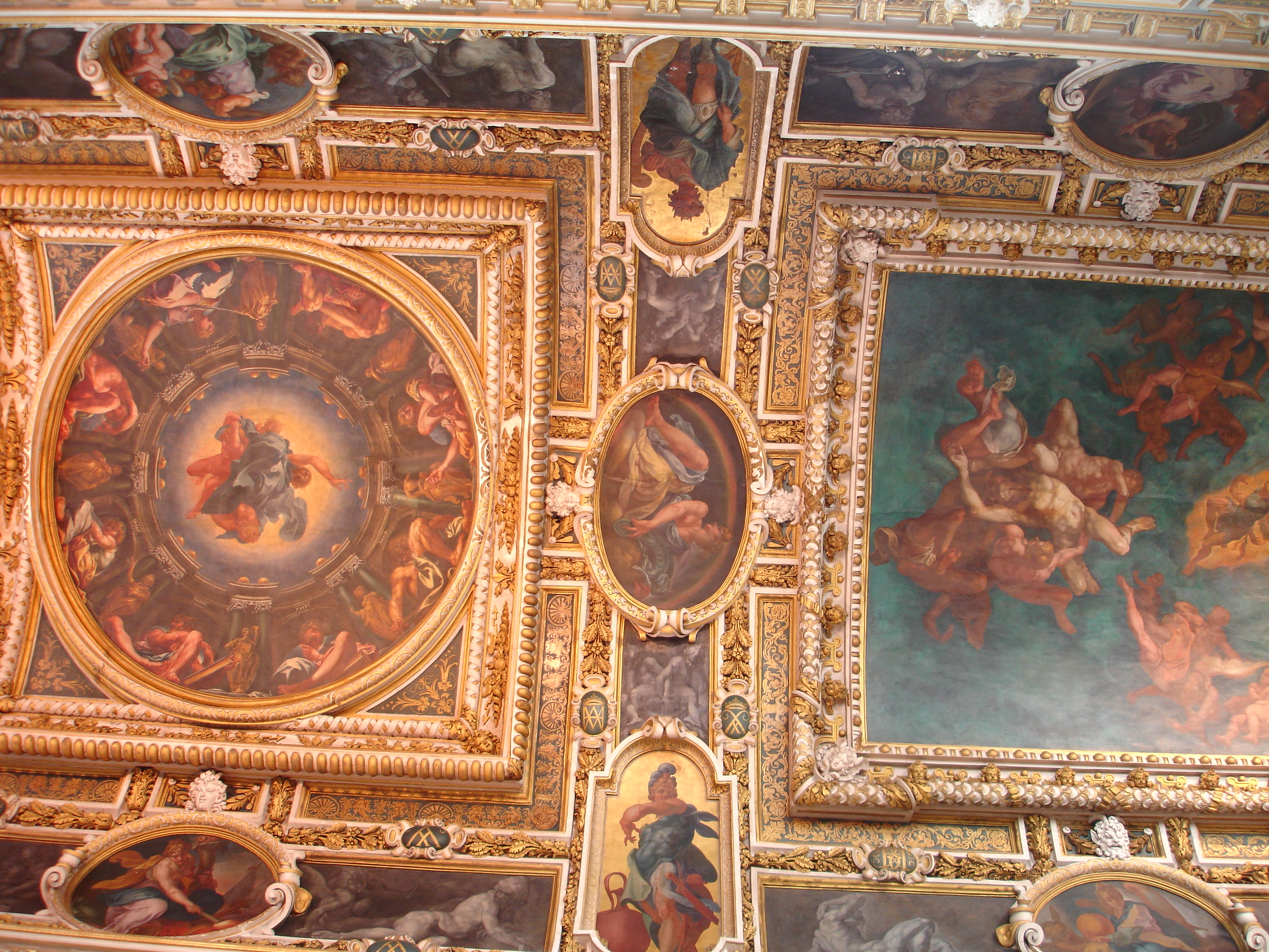 Deckengemälde im Schloss Fontainebleau